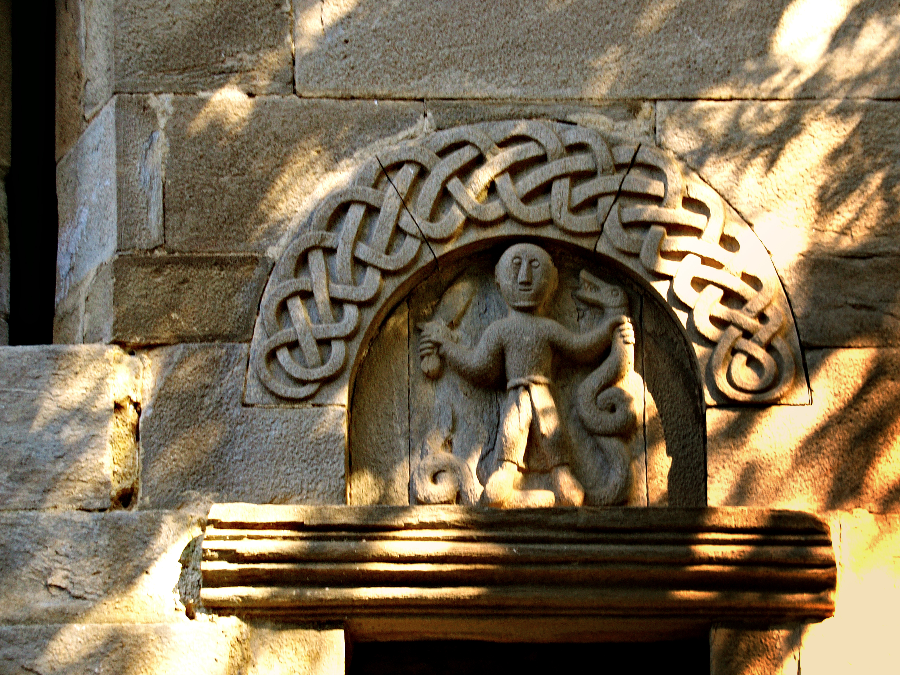 Cambia - Décor du fronton de San Quilicu